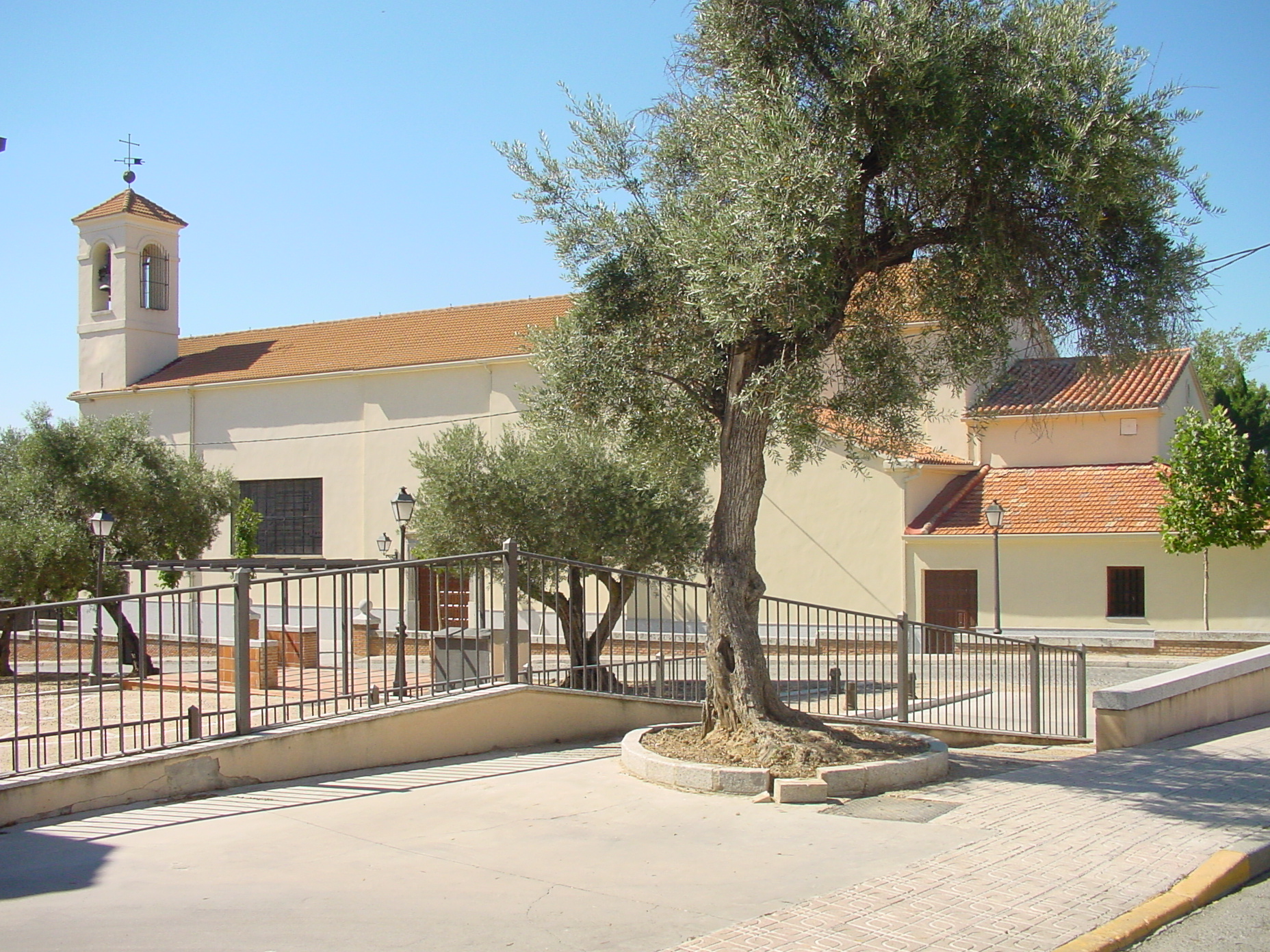 Iglesia en Villaviciosa de Odón.